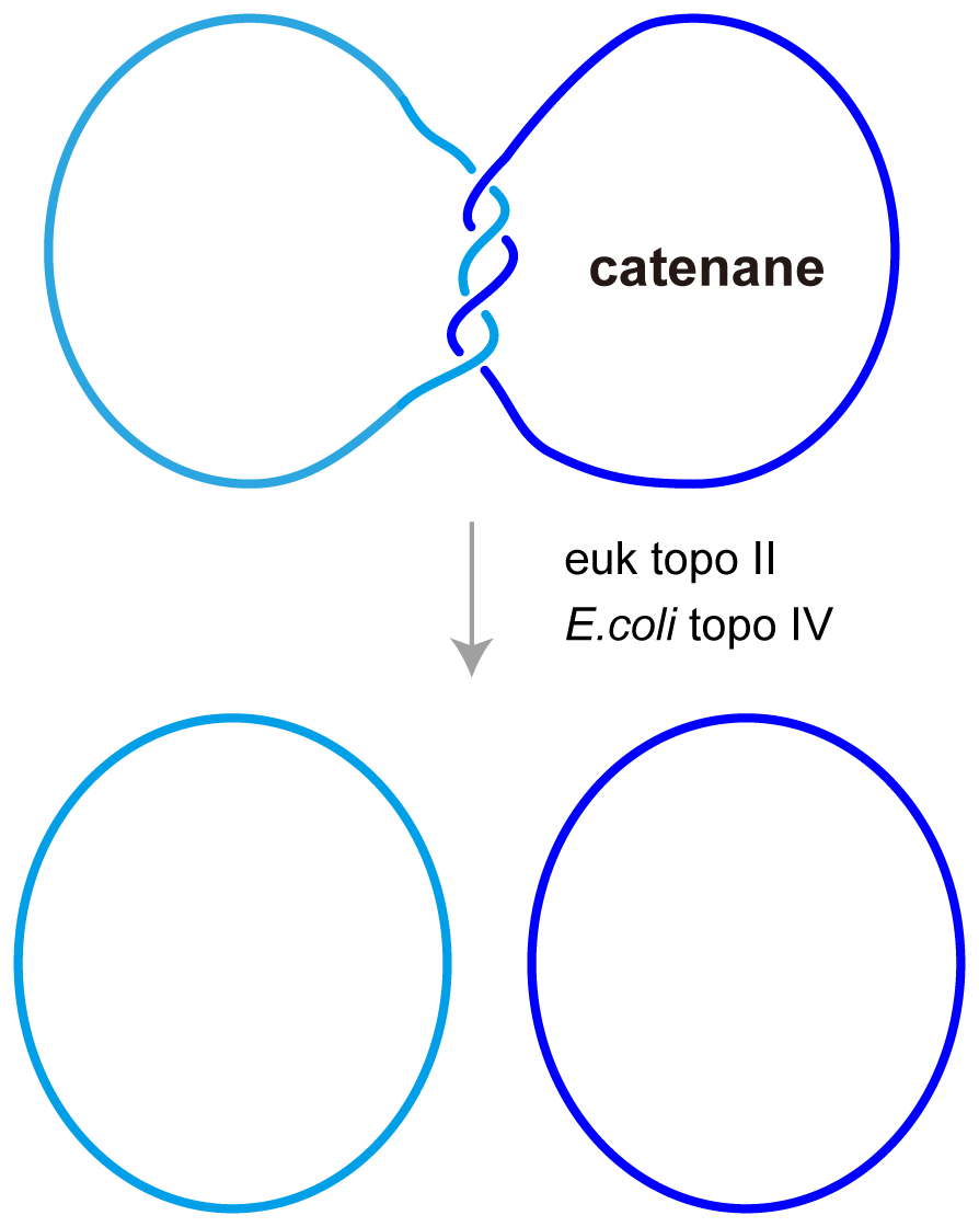 decatenation by type II topoisomerases